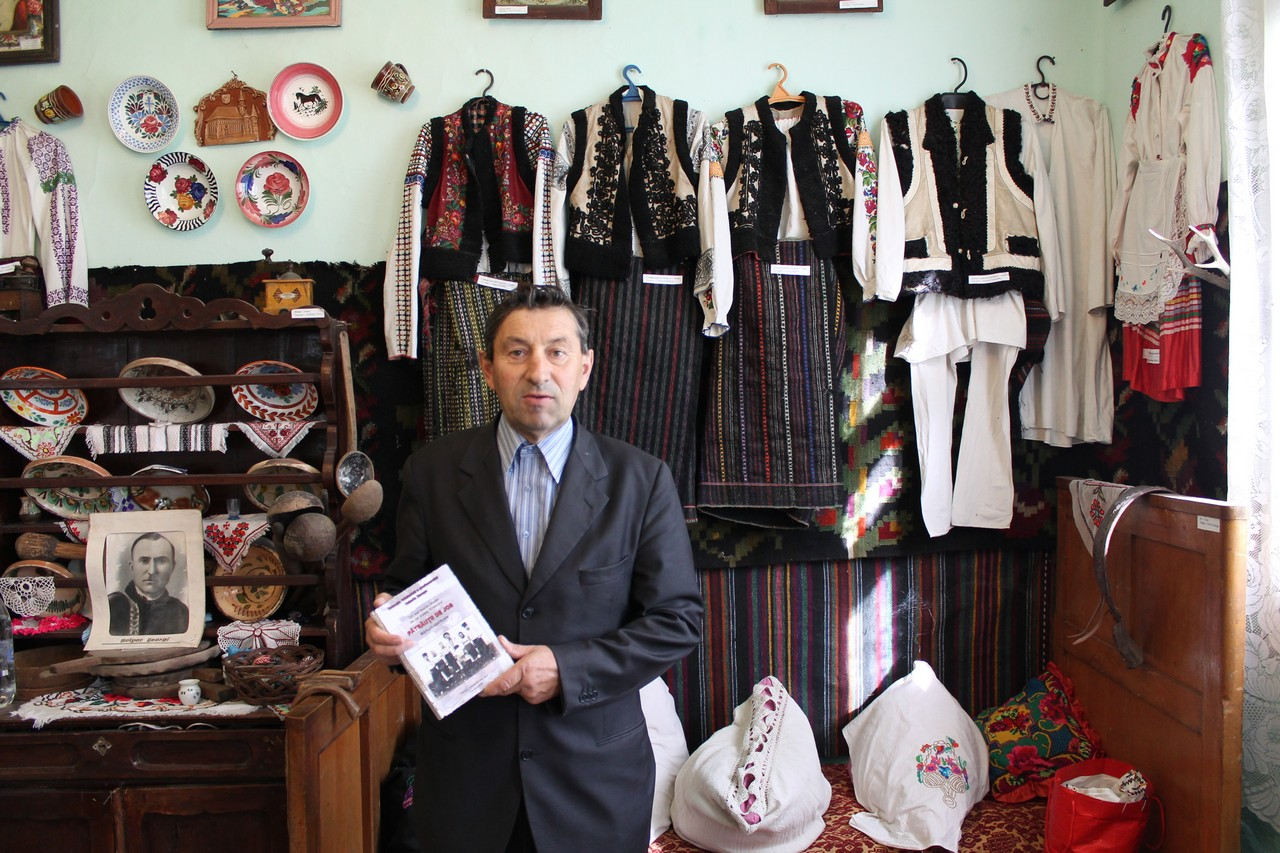 Валерий Змошу со своей книгой